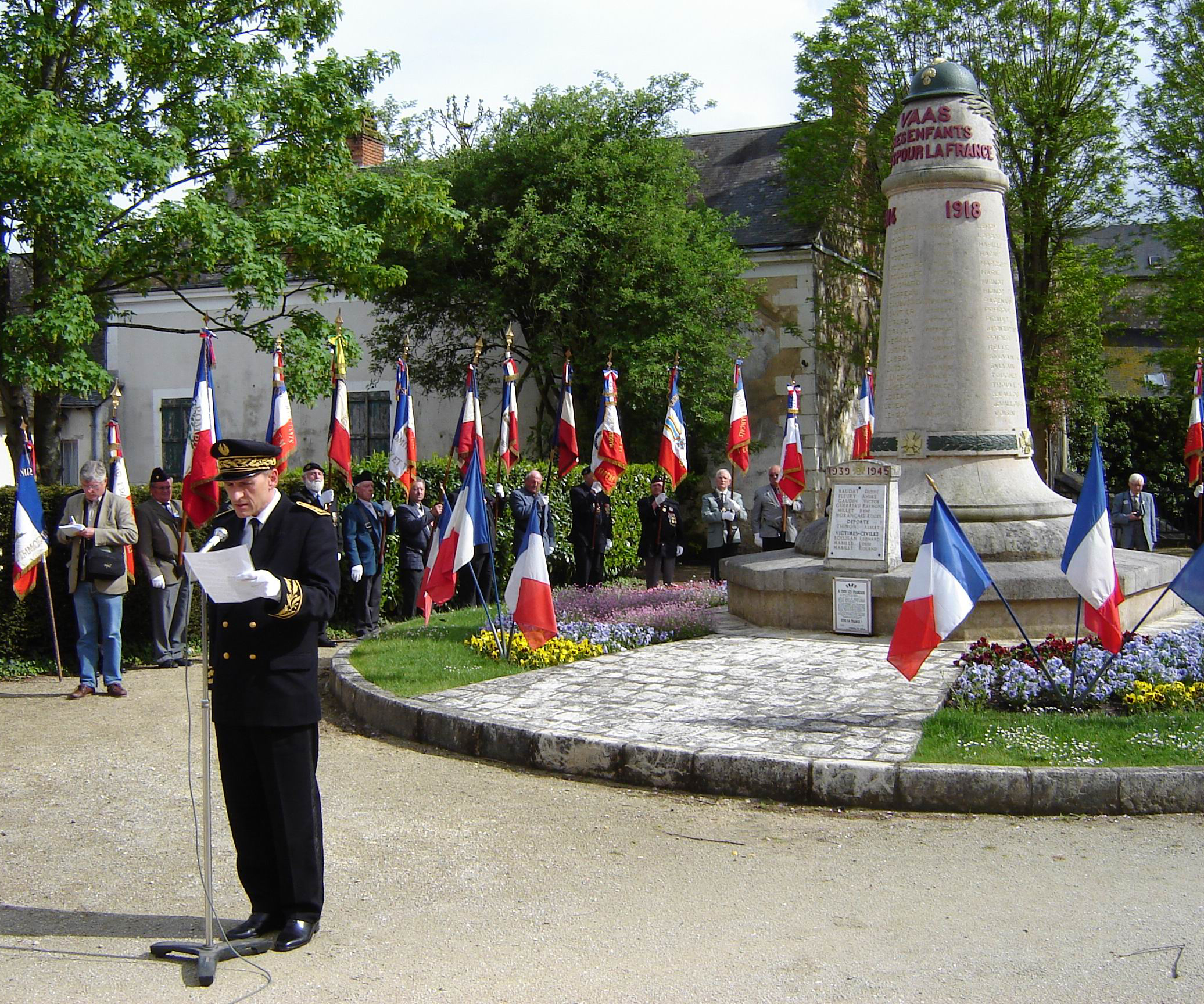 Monument situé dans le jardin de l'ancienne abbaye (aujourd'hui Hôtel de Ville) le jour de la cérémonie inaugurale du mémorial en souvenir de l'aviateur US Alvin Pollingue tombé à Vaas le 17.8.194d et du pont sur le Loir qui sera baptisé du nom de cet aviateur. Cérémonie d'ouverture par le Sous-Préfet de la Flèche Monsieur xx Ce monument anciennement érigé sur la place du village a été déplacé il y a quelques années. Sa date d'origine pourrait remonter aux années 1920.